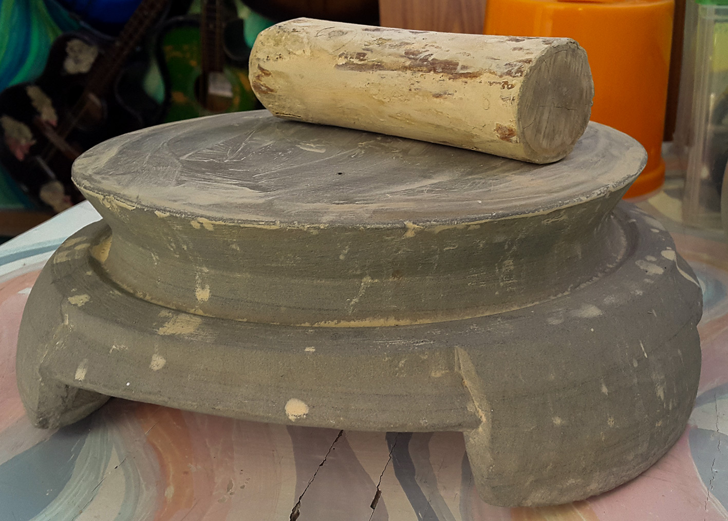 Il tronchetto di Thanaka e la pietra kyauk pyin.